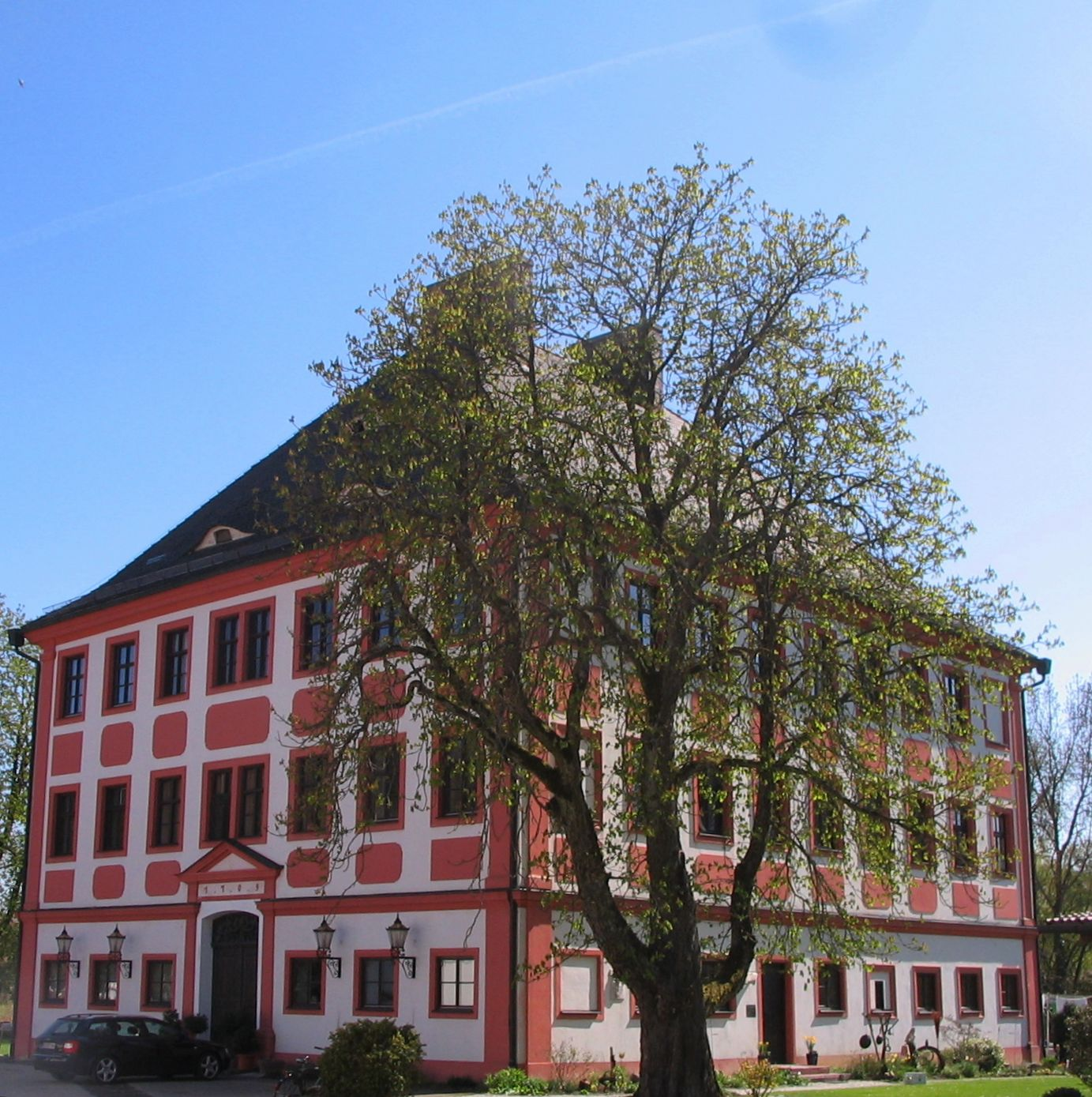 Schloss Herrngiersdorf, Landkreis Kelheim, Niederbayern